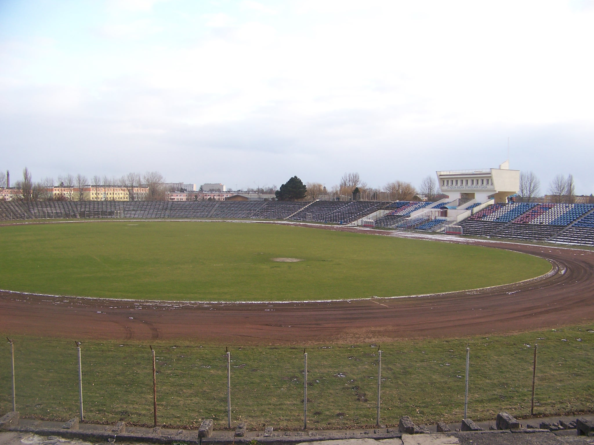 Stadion Gwardii Koszalin; Gwardia Koszalin stadium